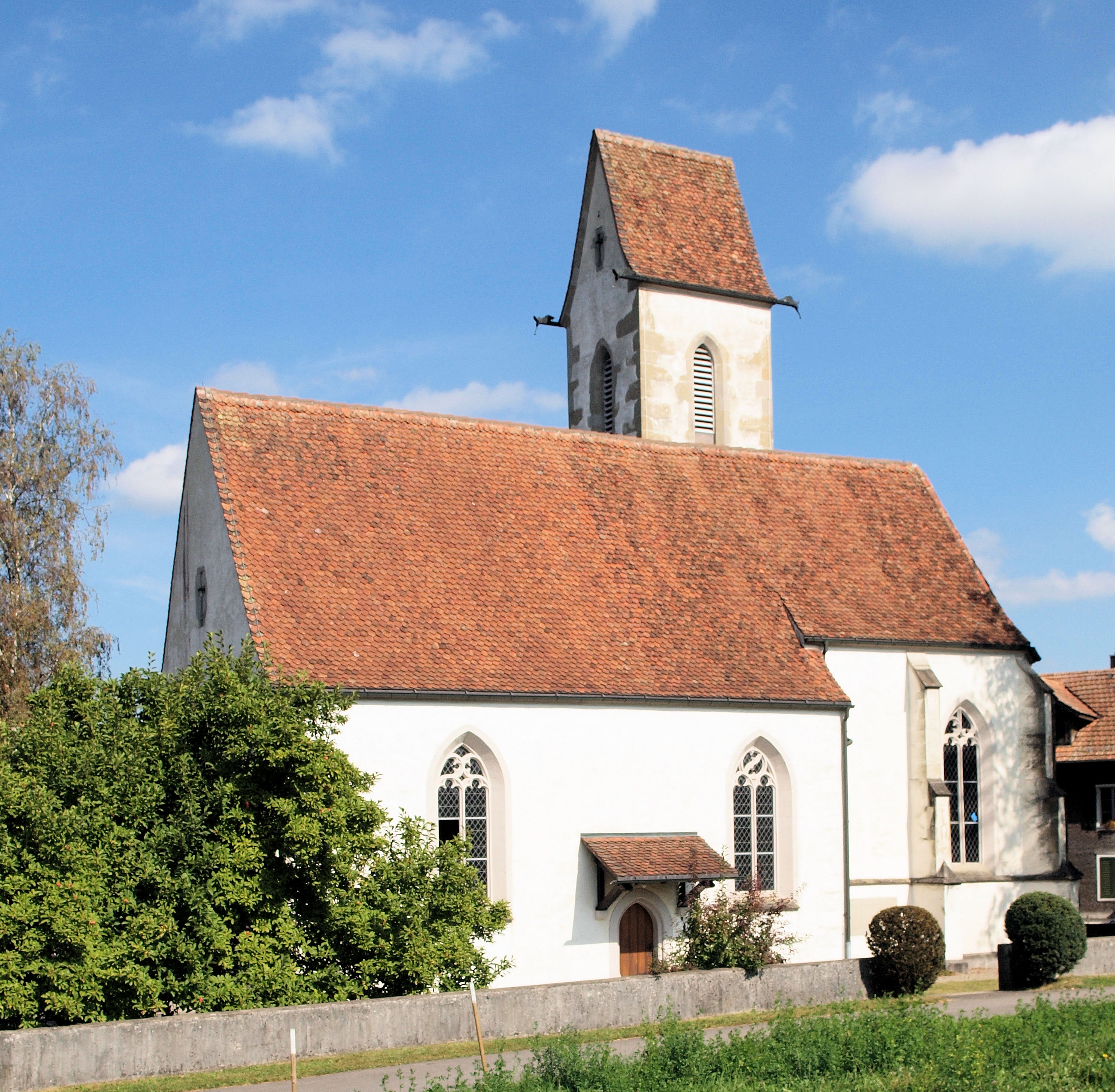 Die Kirche St. Wolfgang in Hünenberg (Kanton Zug). Ansicht von Südwesten